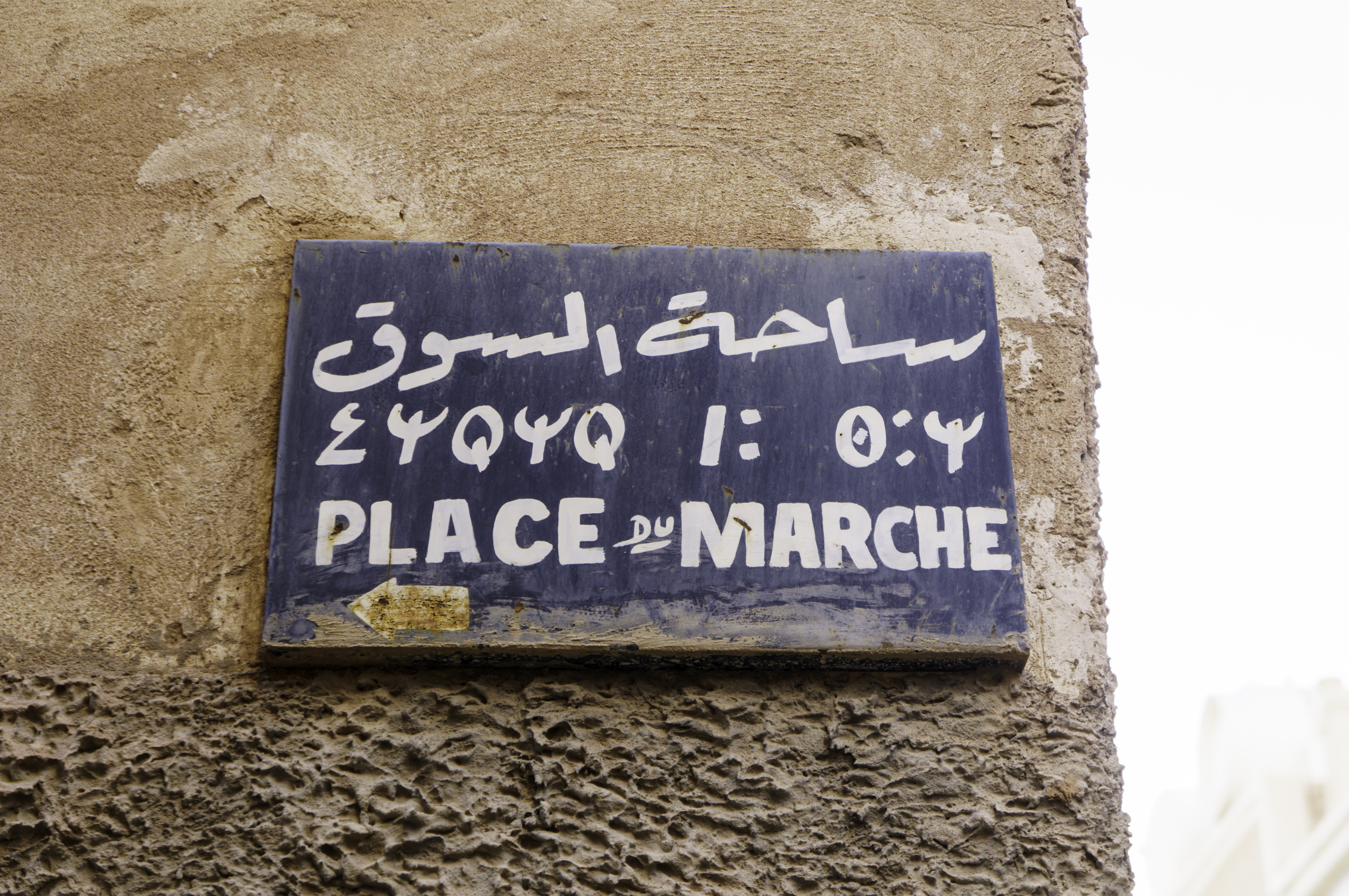 Sign in Arabic, Berber and French - Beni Isguen, M'zab Valley